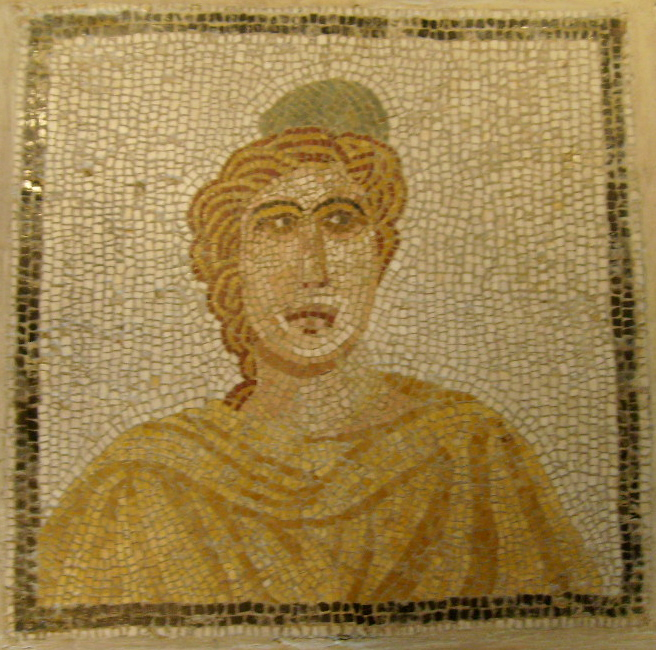 Mosaïque représentant une tête féminine Découverte à Althiburos (Tunisie) et datée du IIIe siècle ap. J.-C. Exposée au musée de l'Institut du monde arabe à Paris